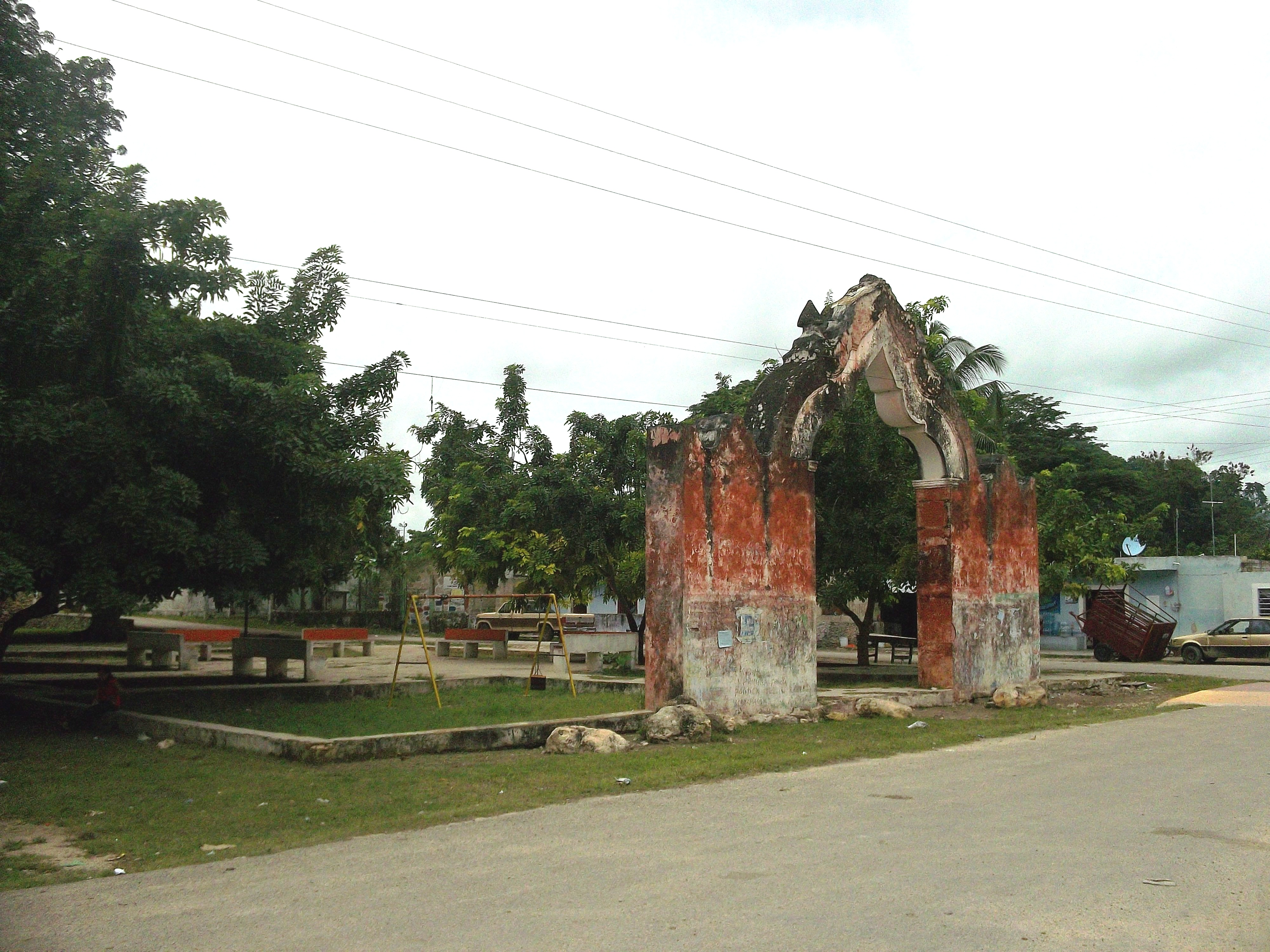 Parque principal de X-Kanchakán, Yucatán.